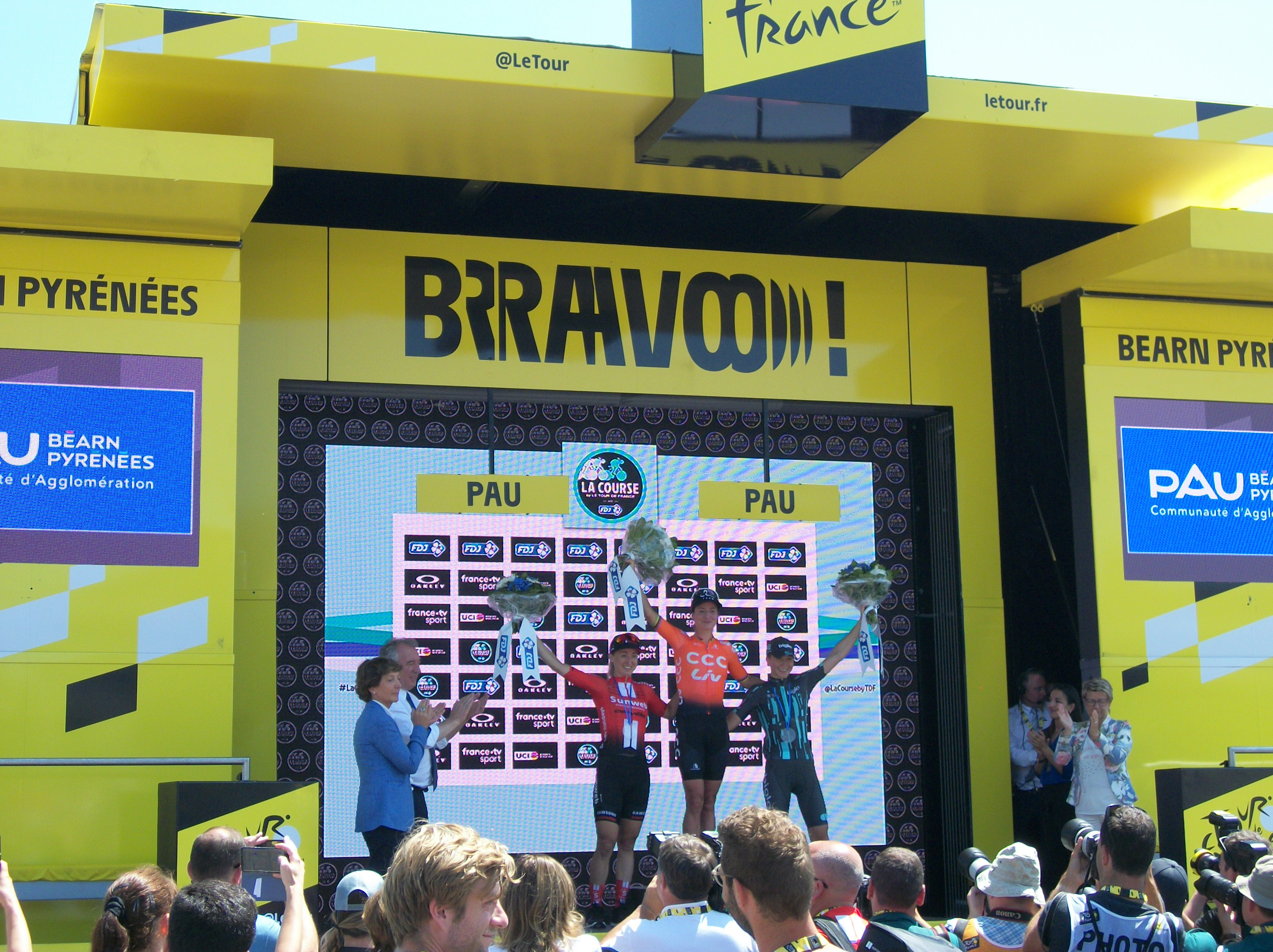 Podium de La course by Le Tour de France 2019 à Pau ː 1er ː Marianne Vos, 2ième ː Leah Kirchmann, 3ième Cecilie Uttrup Ludwig